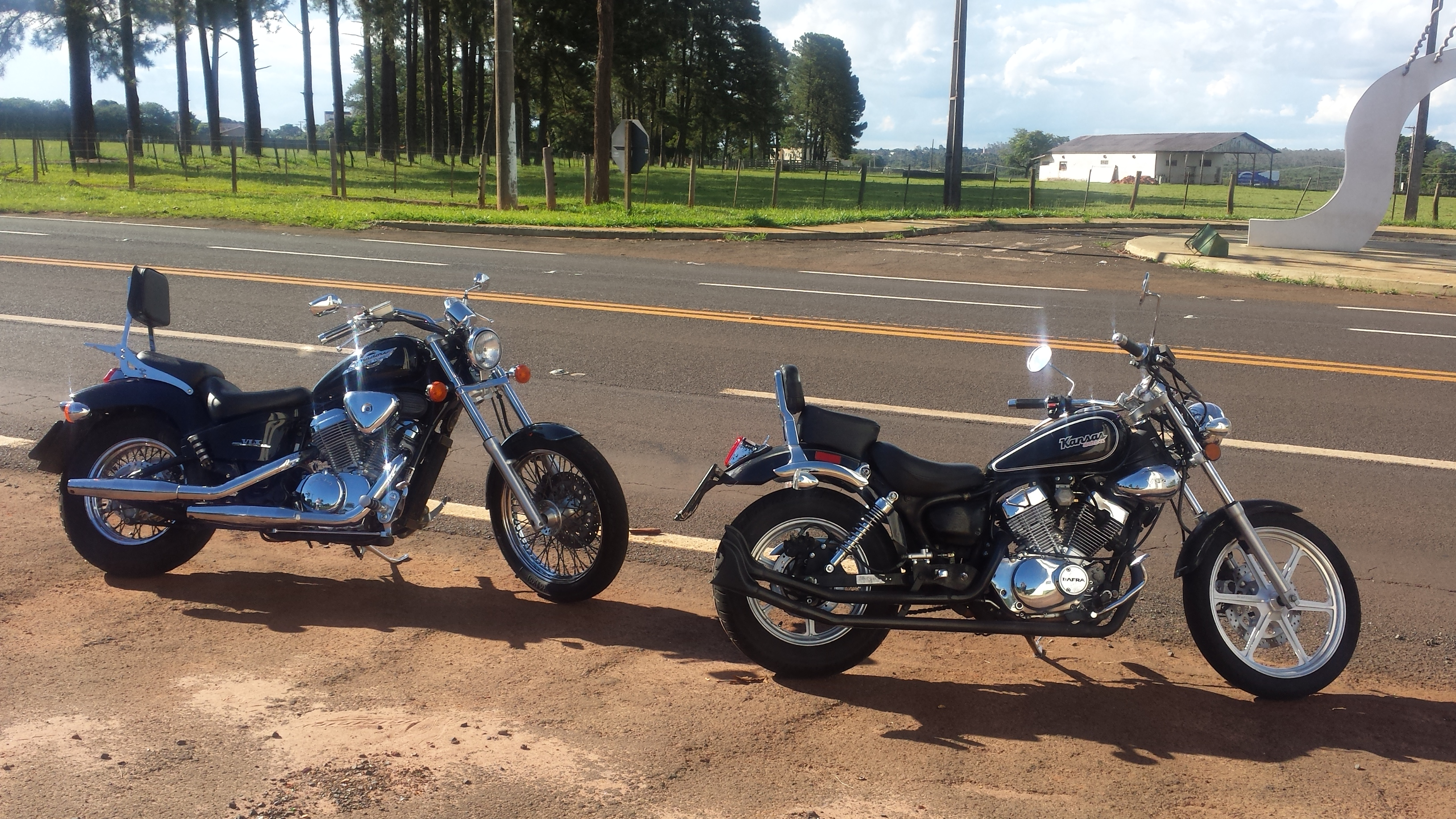 Duas motos customs na beira da rodovia